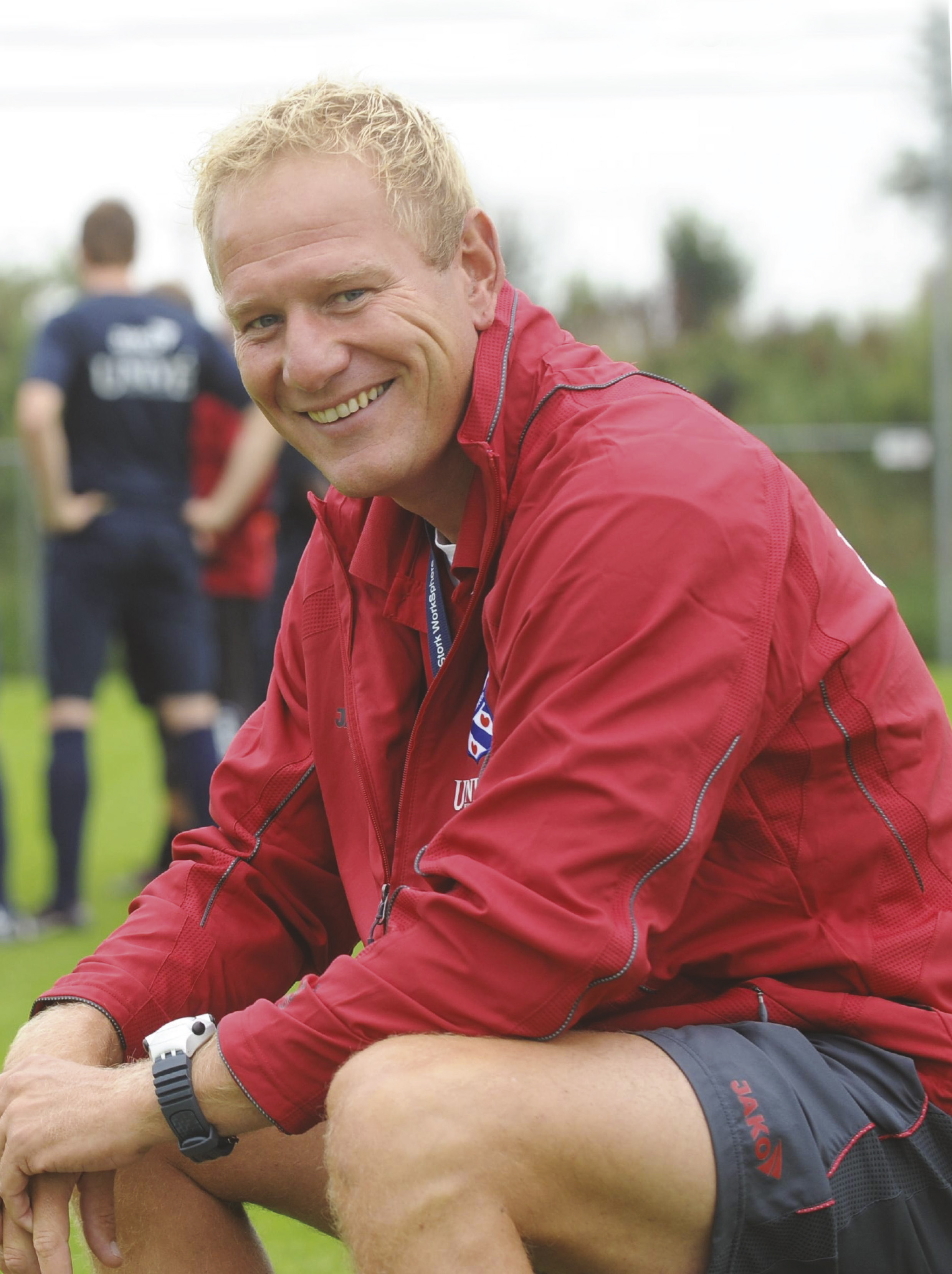 Jan de Jonge